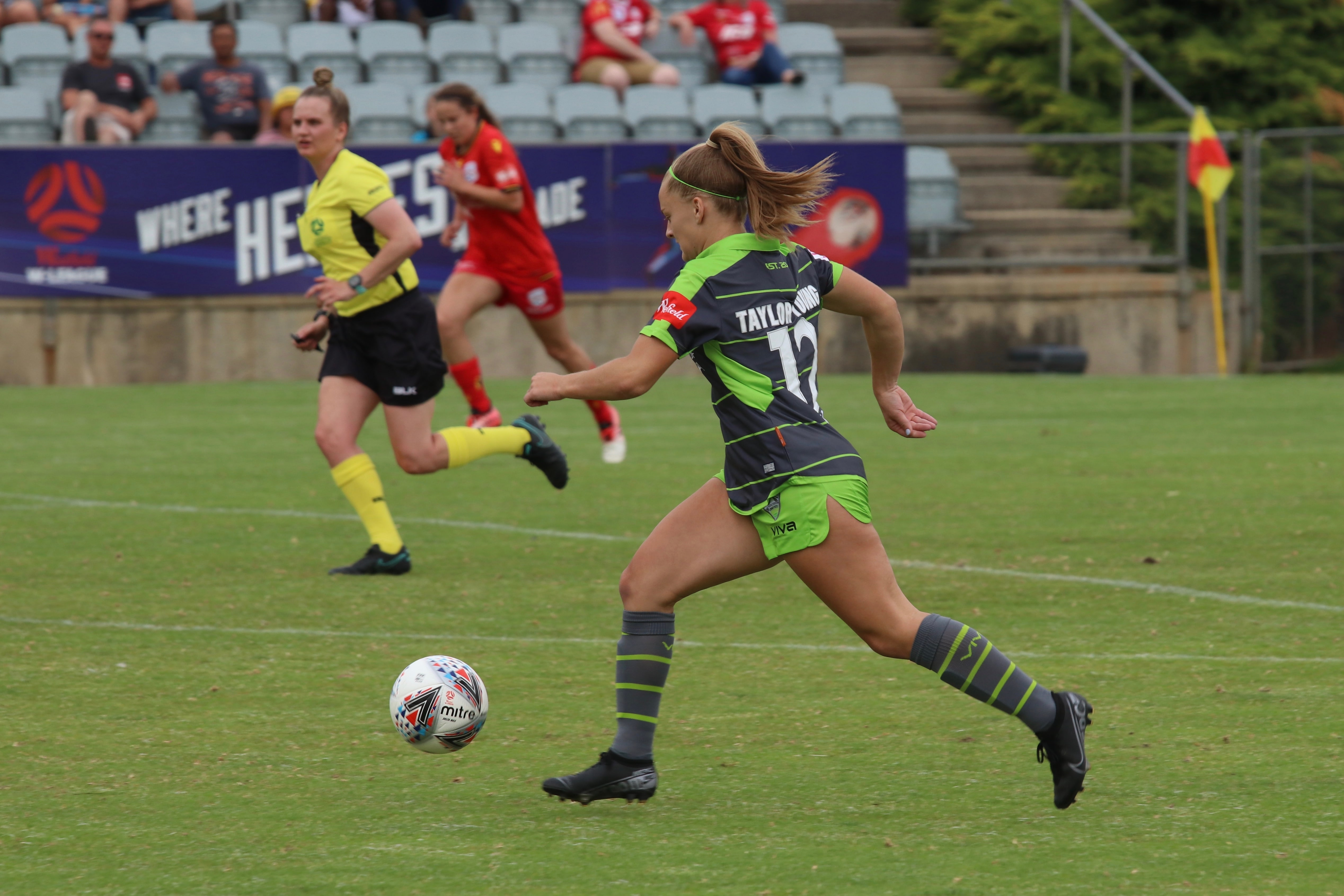 TaylorYoung